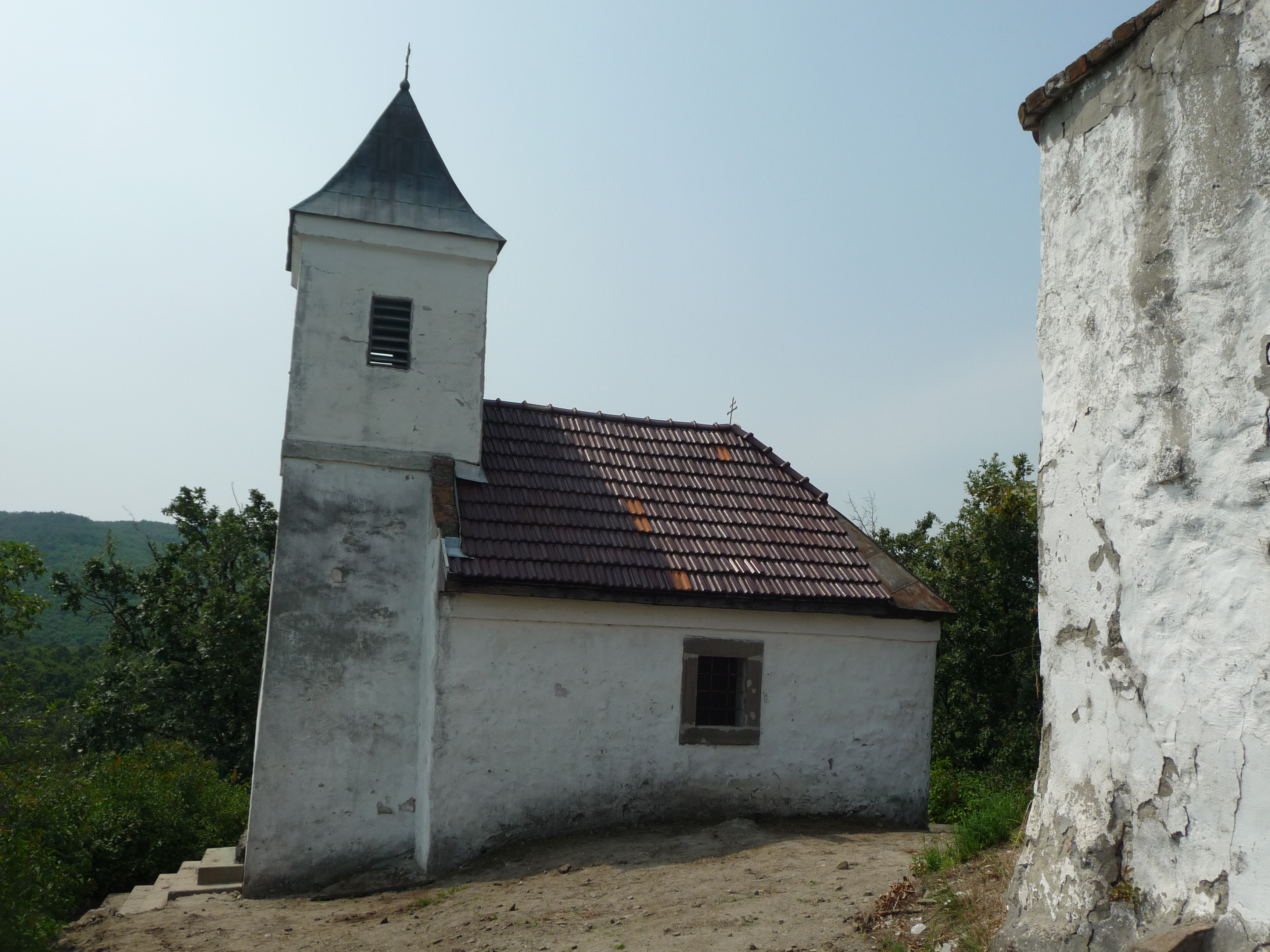 A Szent Anna-kápolna Bujákon